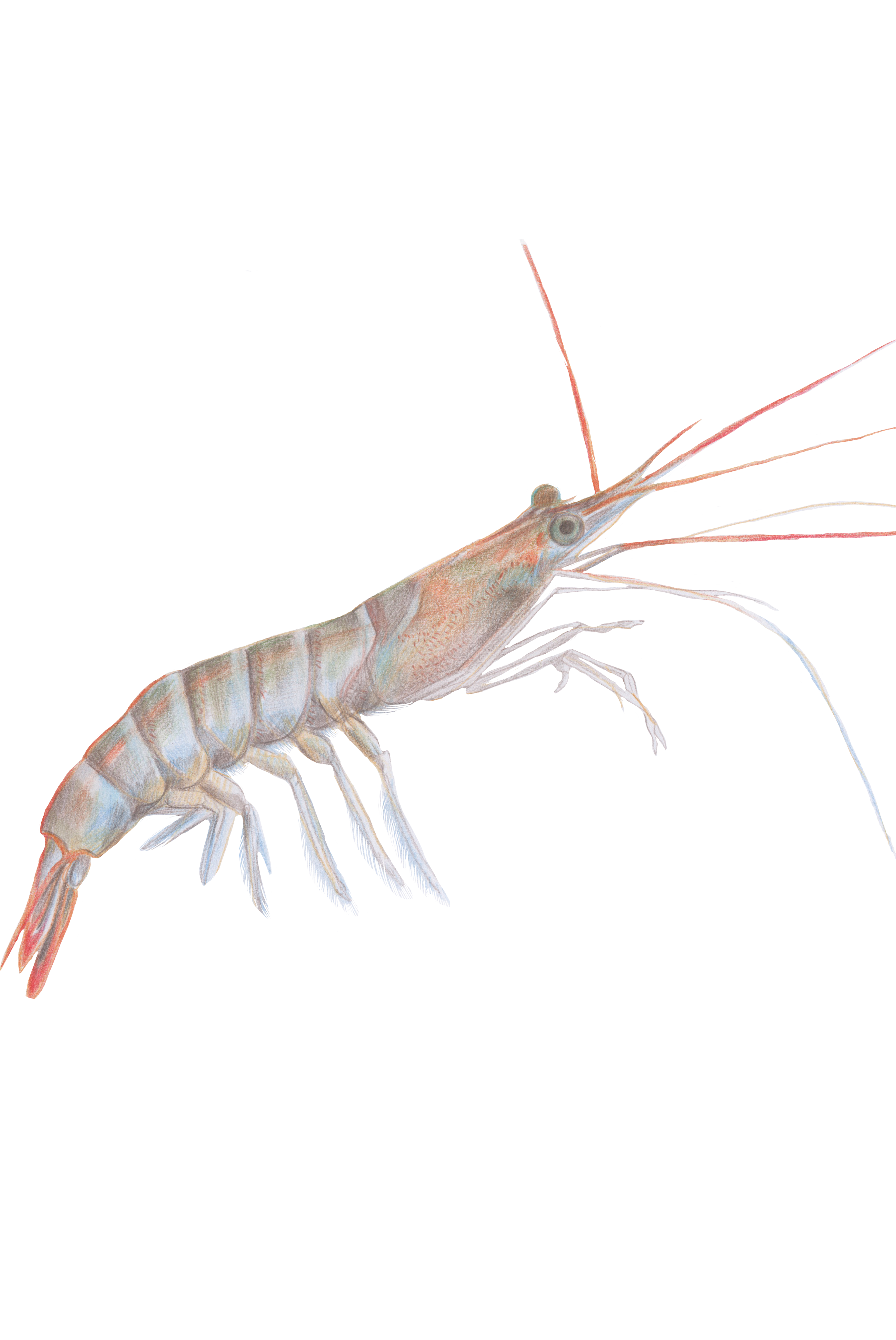 Desenho à lápis do camarão Xiphopenaeus kroyeri. Desenho originalmente comissionado pela ONG Rare Brazil (